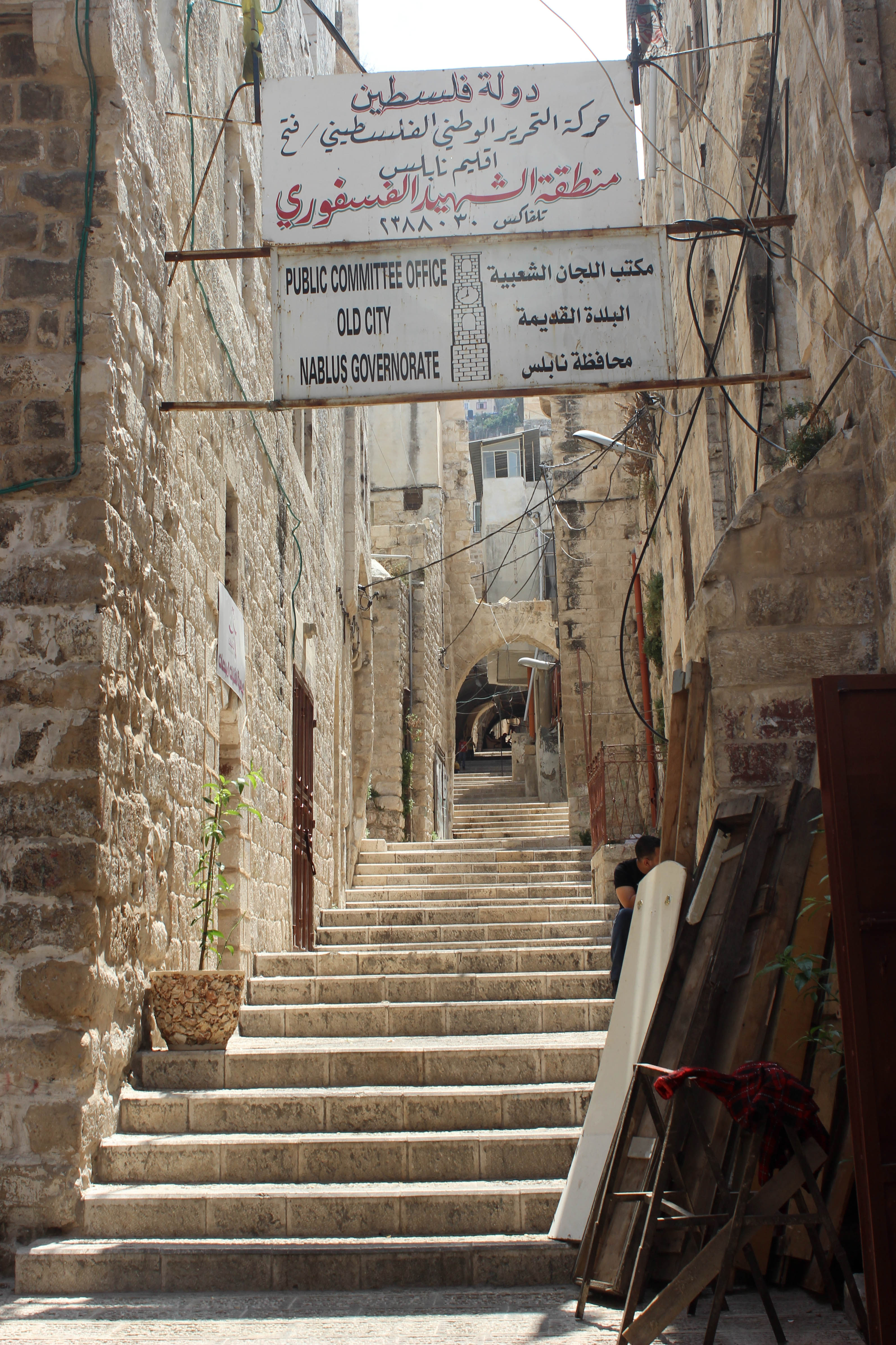 • نابلس القديمة • تصوير: معتز توفيق اغبارية • 12/08/2013